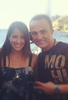 Denise Rosenthal junto a Luis Lopez Enero 2012